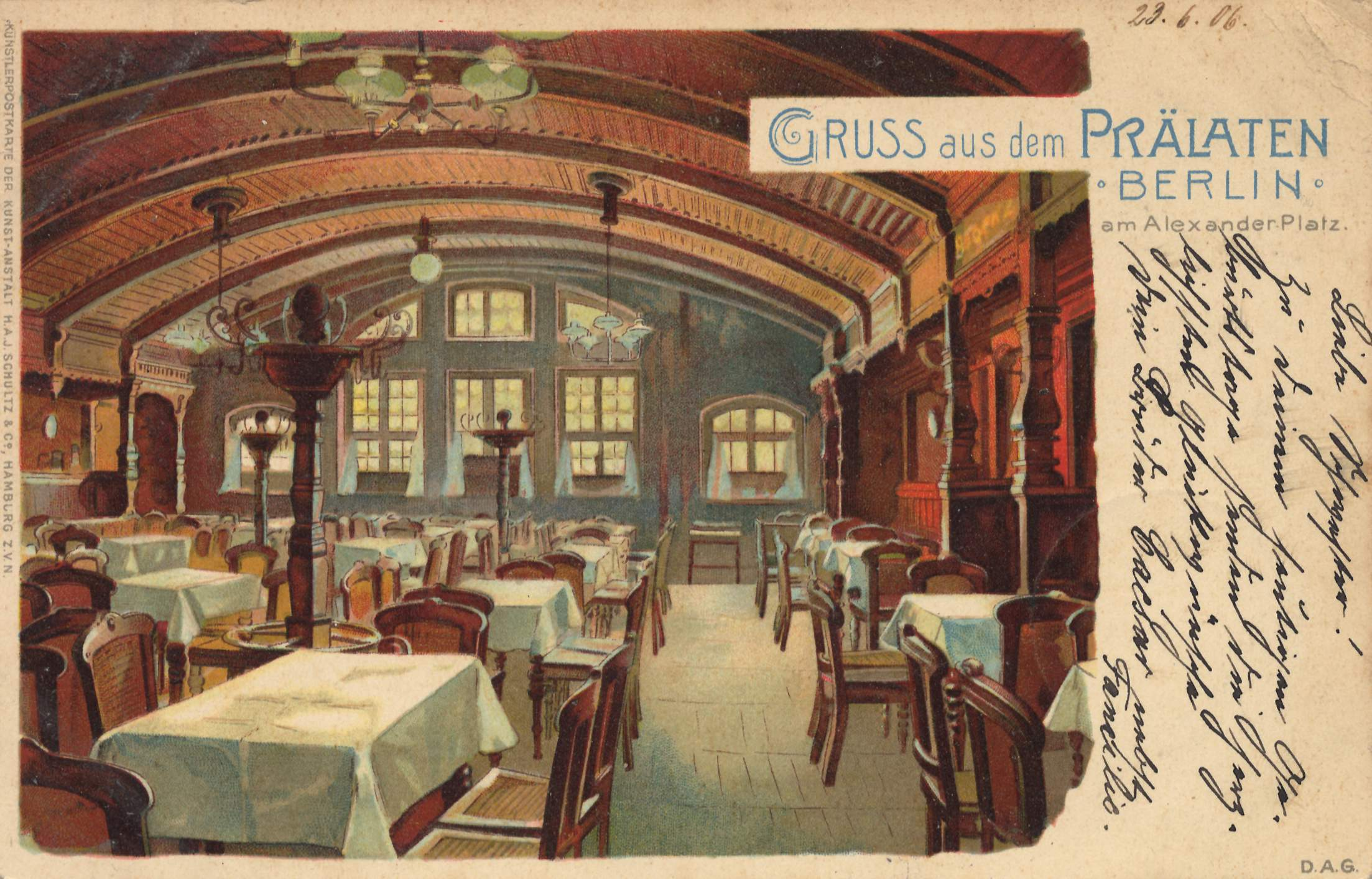 Prälat am Alexanderplatz in Berlin-Mitte